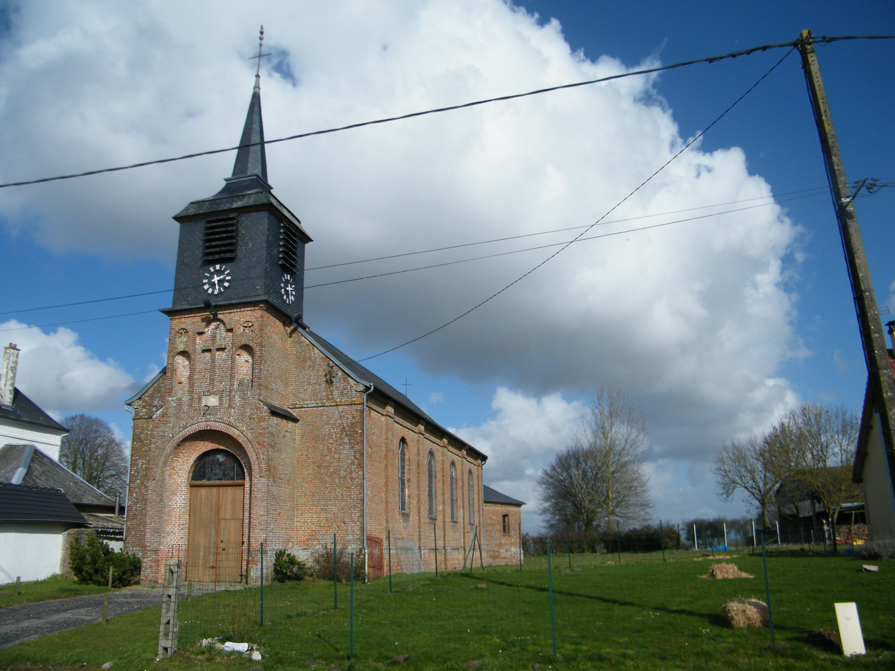 L'église Notre-Dame-du-Bon-Secours de Marcheville, commune de Crécy-en-Ponthieu.